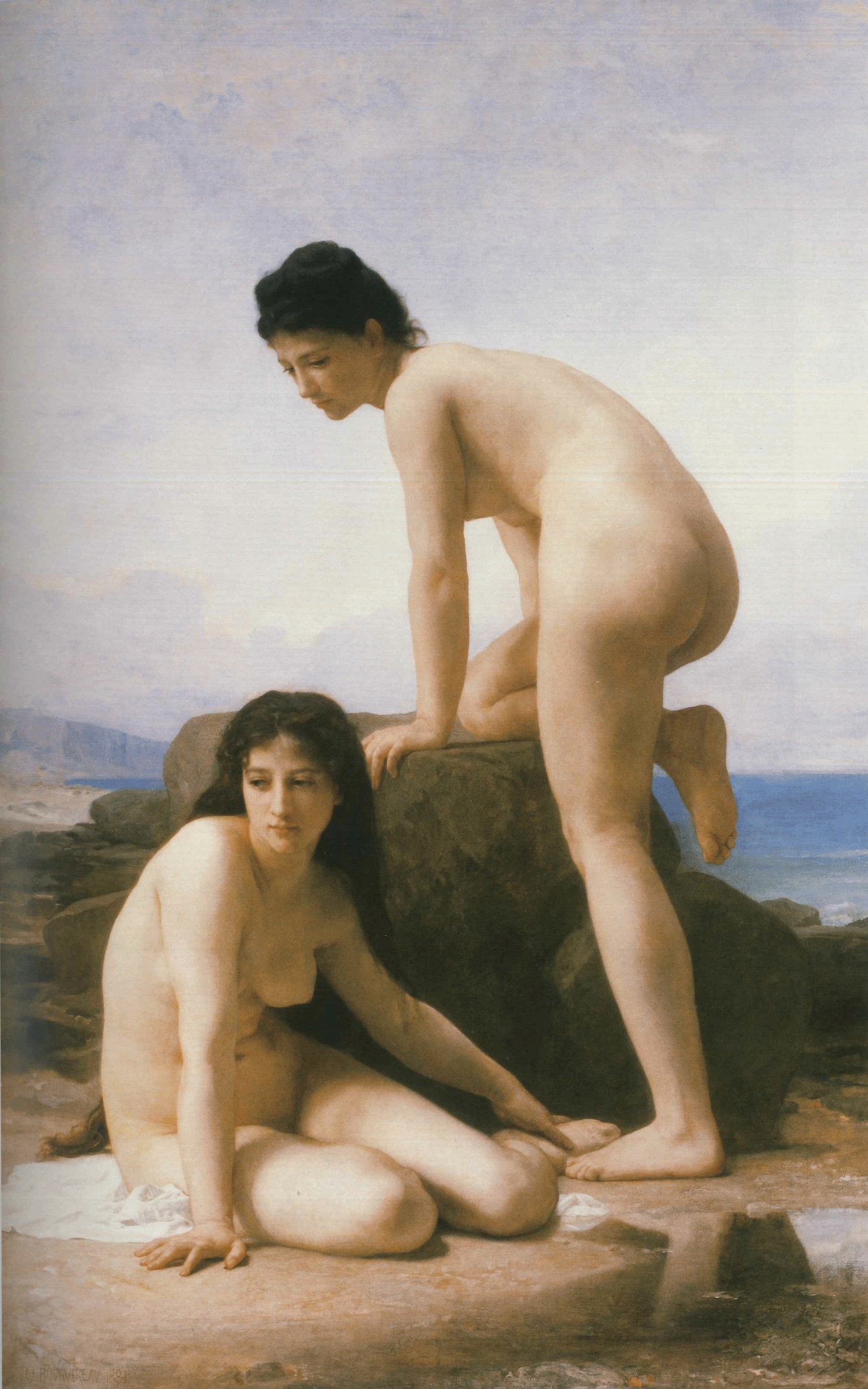 William-Adolphe Bouguereau (1825-1905) - Les Deux Baigneuses (1884).jpg